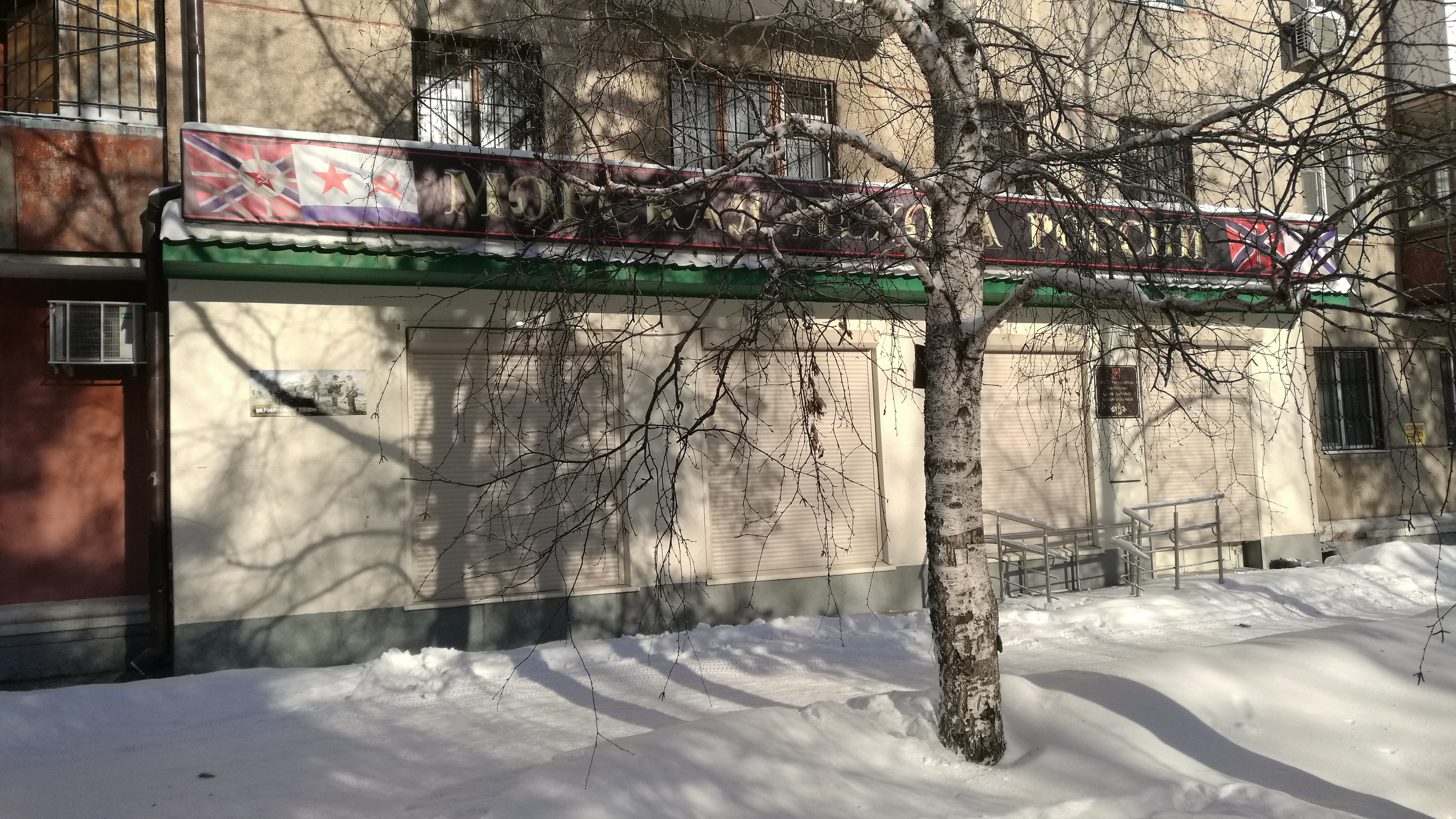 Oficejo de organizaĵo de veteranoj de la Mara Infanterio de Rusio. Tjumeno, Rusio.